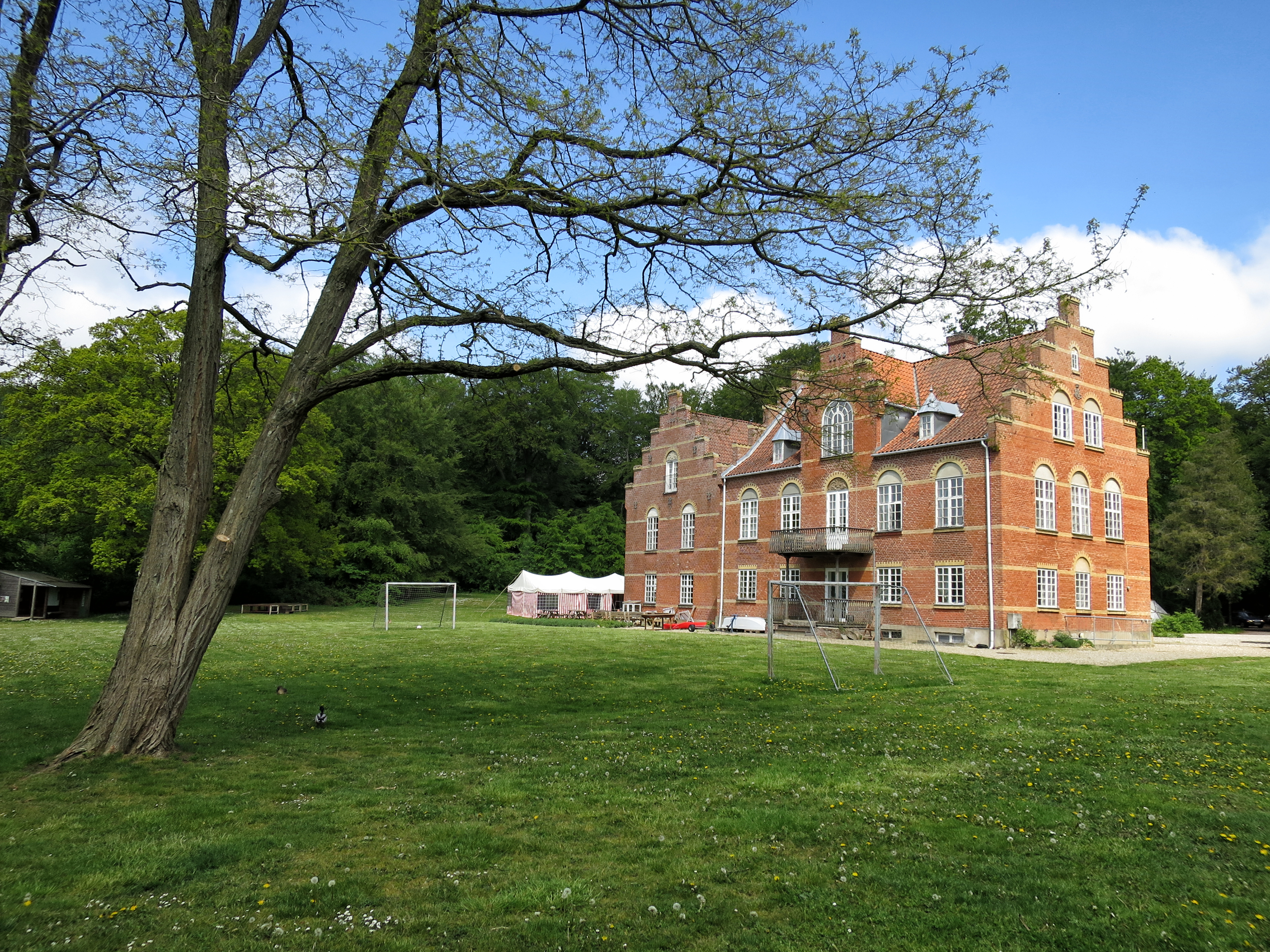 Lystslottet Sølyst ved Skarresø i Jyderup. Huser i dag Jyderup Højskole.